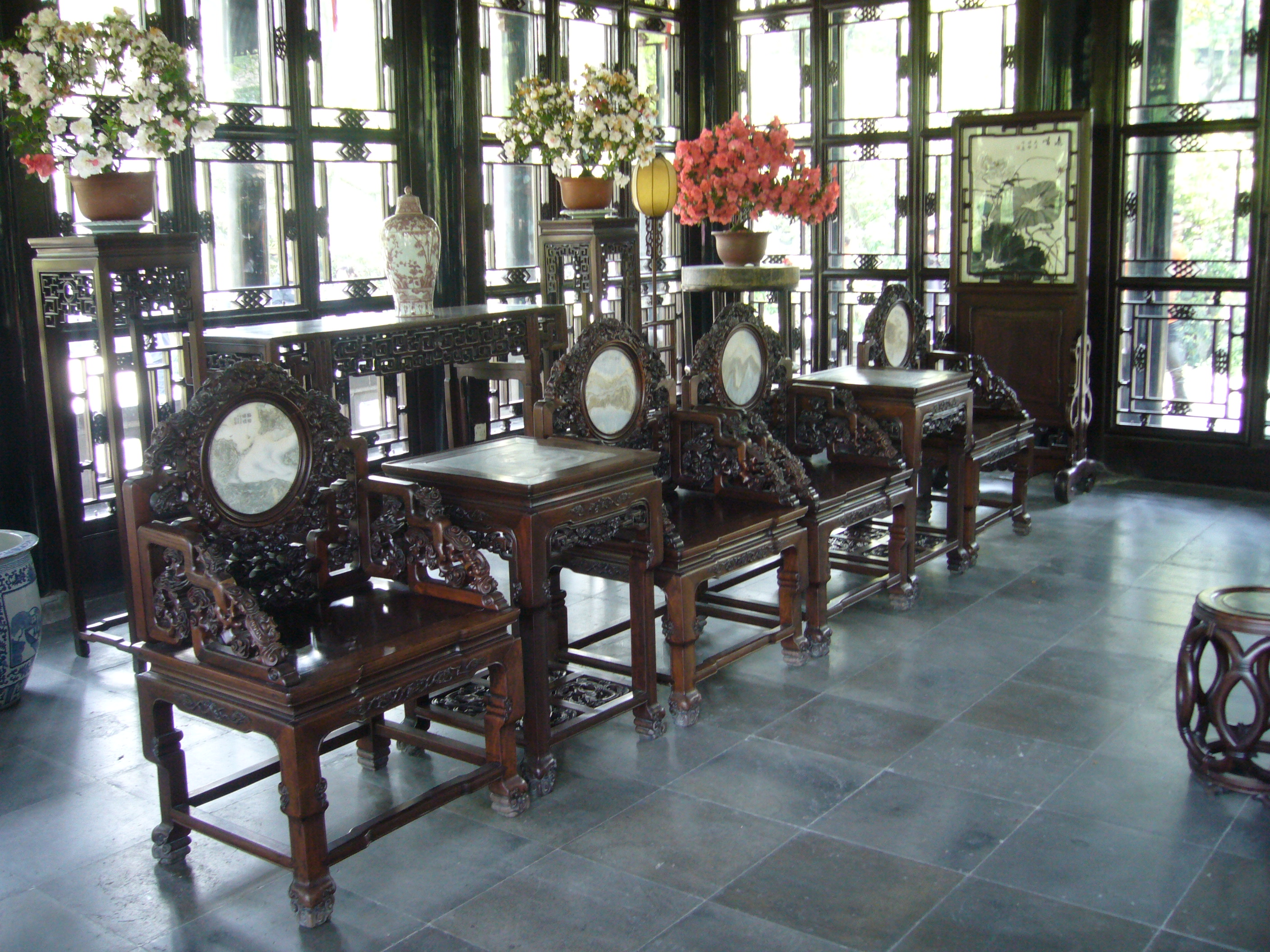 Hall of Distant Fragrance, interieur